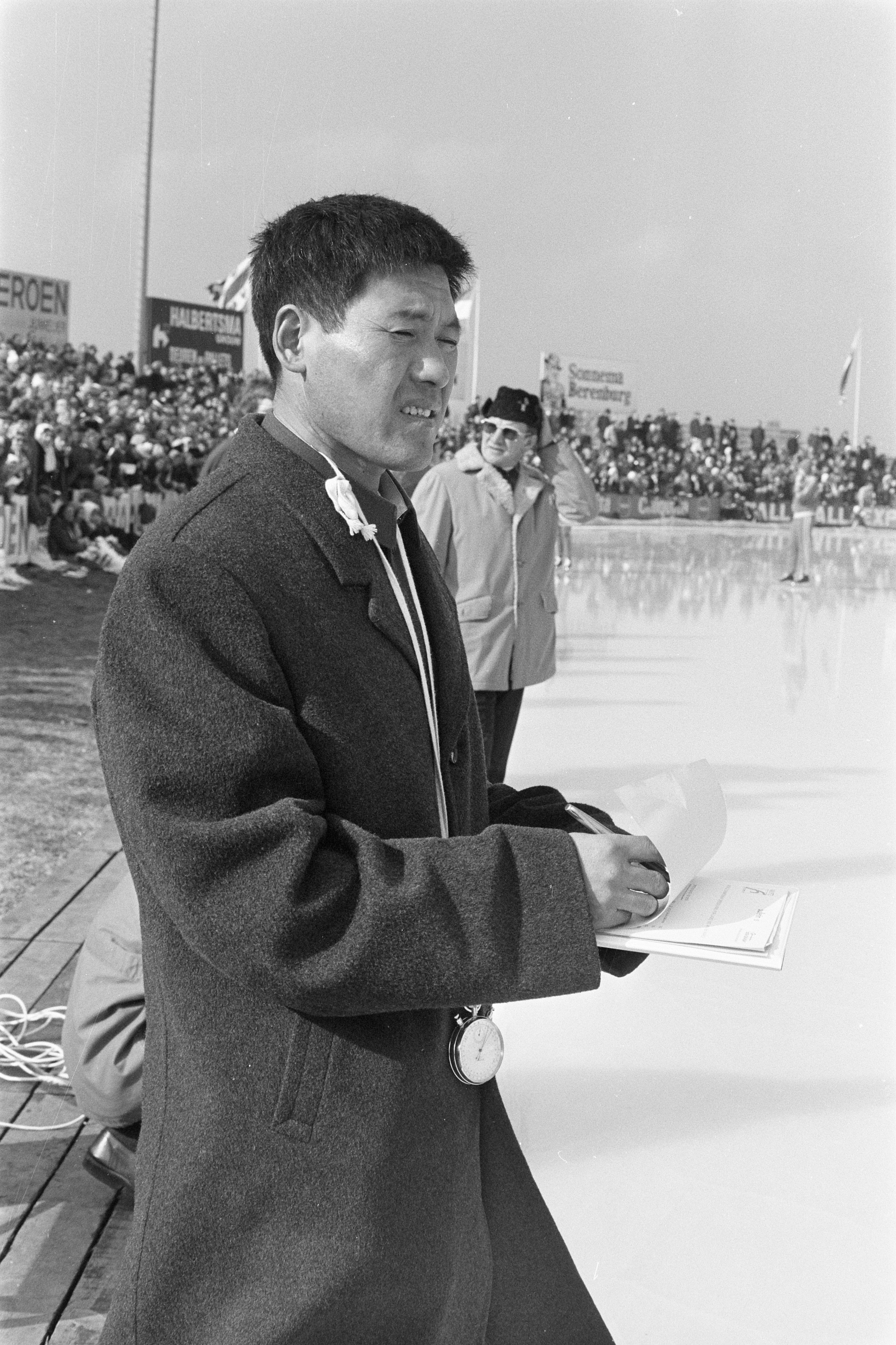 Collectie / Archief : Fotocollectie Anefo Reportage / Serie : [ onbekend ] Beschrijving : Wereldkampioenschappen schaatsen dames in Heerenveen; Chinese trainer Datum : 5 maart 1972 Locatie : Friesland, Heerenveen Trefwoorden : SCHAATSEN, sport, trainers, wereldkampioenschappen Fotograaf : Verhoeff, Bert / Anefo Auteursrechthebbende : Nationaal Archief Materiaalsoort : Negatief (zwart/wit) Nummer archiefinventaris : bekijk toegang 2.24.01.05 Bestanddeelnummer : 925-4354